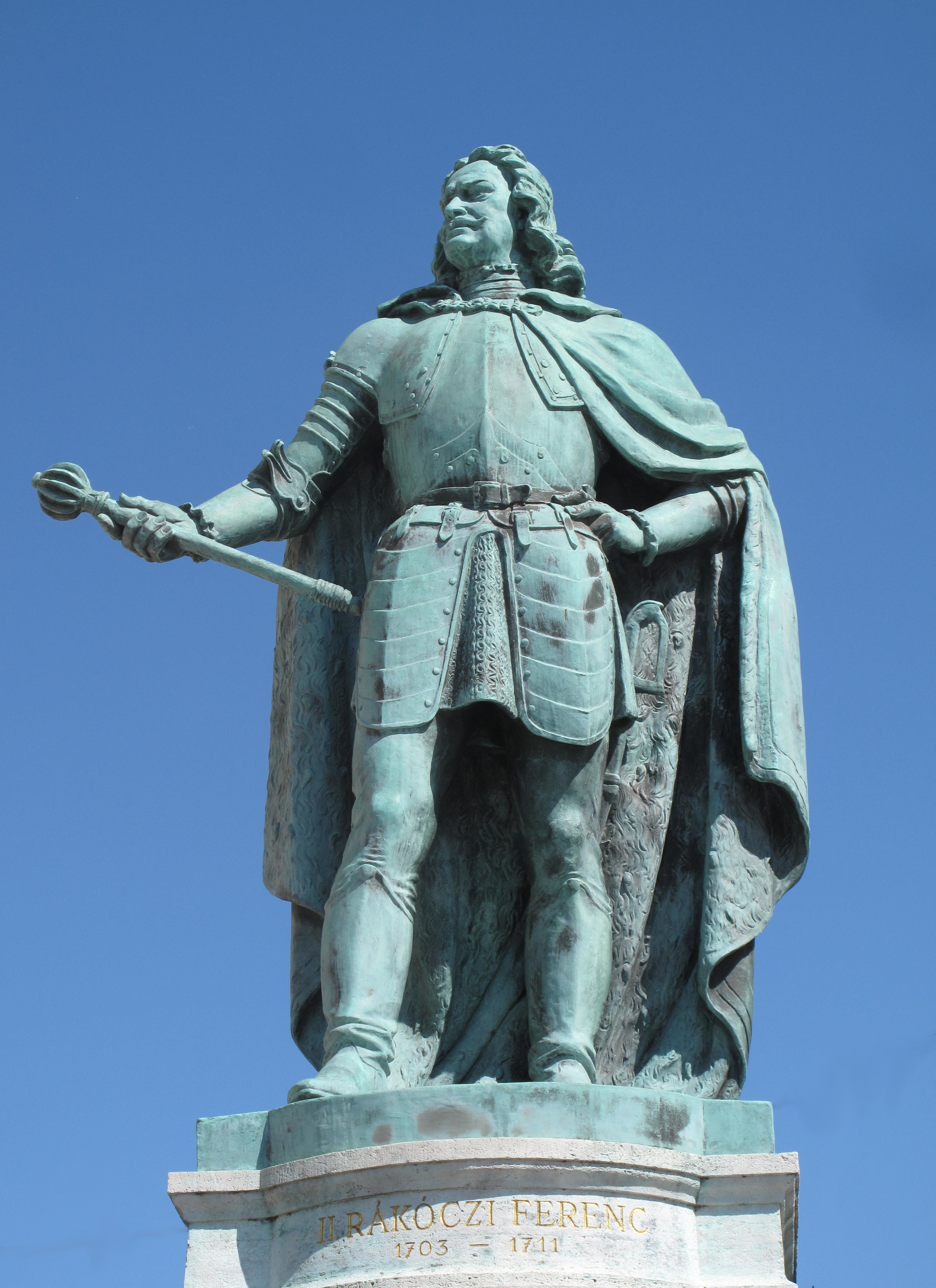 Náměstí Hrdinů, Budapešť